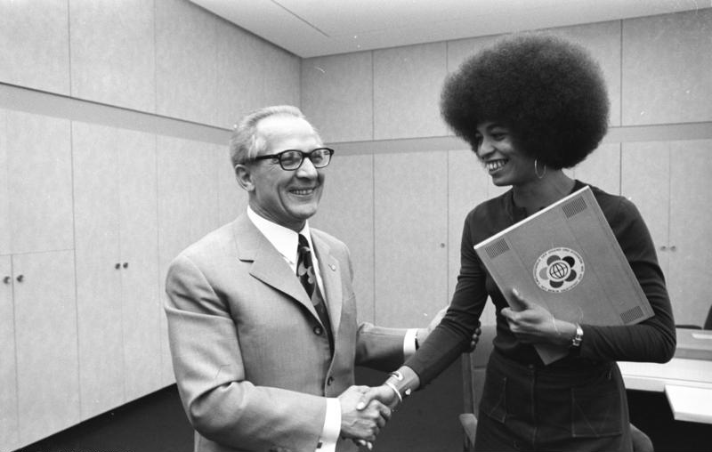 ADN-ZB / Koard 11.9.72 Berlin: Erich Honecker empfing Angela Davis. - Der Erste Sekretär des ZK der SED, Erich Honecker, empfing am 11.9.72 die amerikanische Bürgerrechtskämpferin Angela Davis. Während dieser Begegnung überreichte er der Vertreterin des anderen Amerikas die Einladung für die Weltfestspiele der Jugend und Studenten 1973 in der DDR-Hauptstadt.